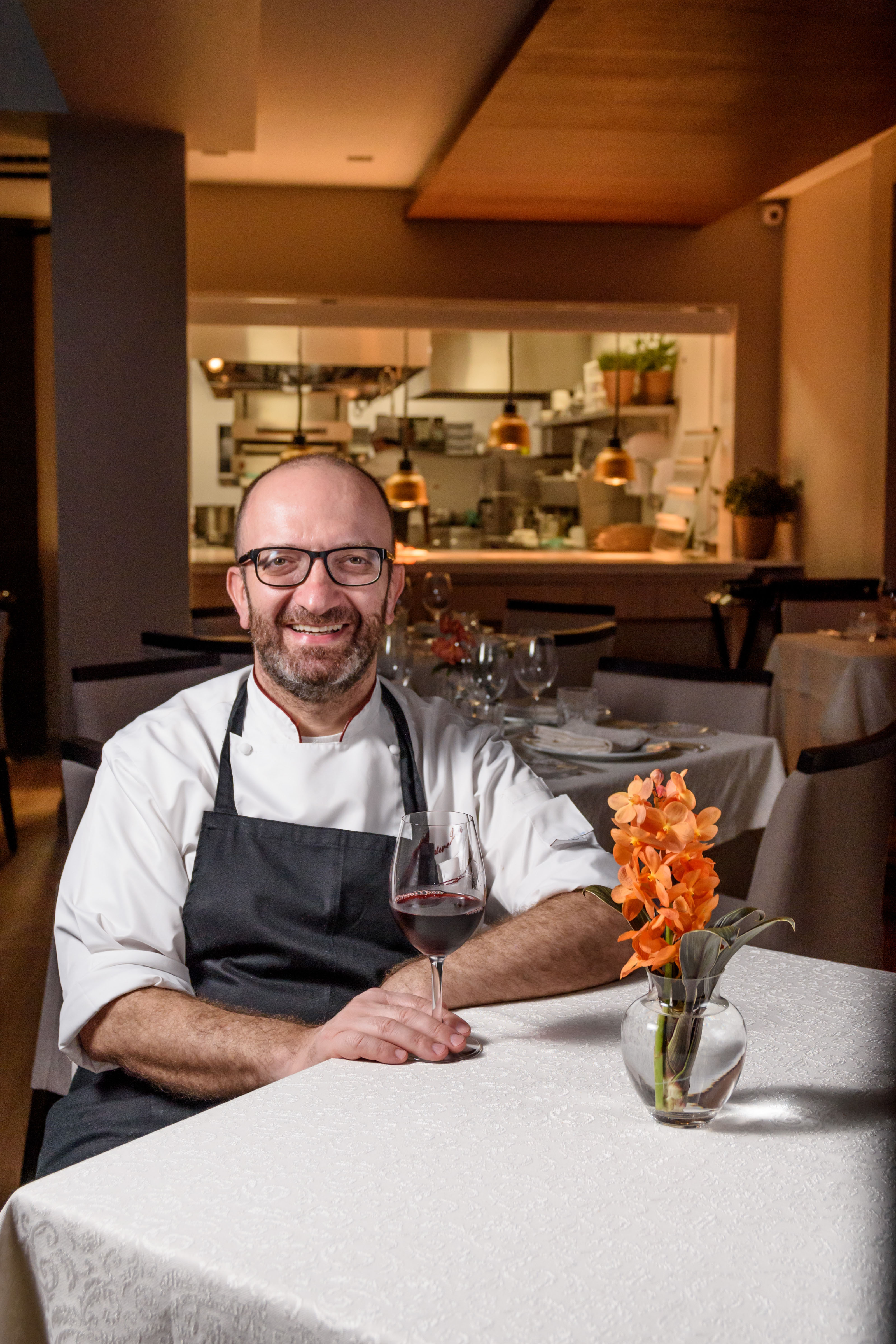 Loi